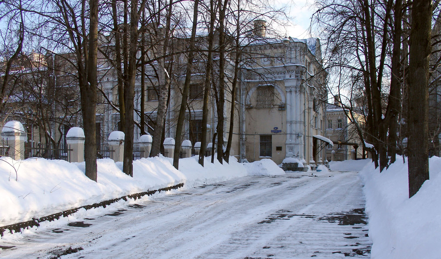 Moscow, Vorontsovo Pole street. Former church of Elijah, former Museum of Orient, now closed indefinitely. Москва, улица Воронцово Поле. Бывшая Ильинская церковь, бывший музей народов Востока, ныне музейный склад.